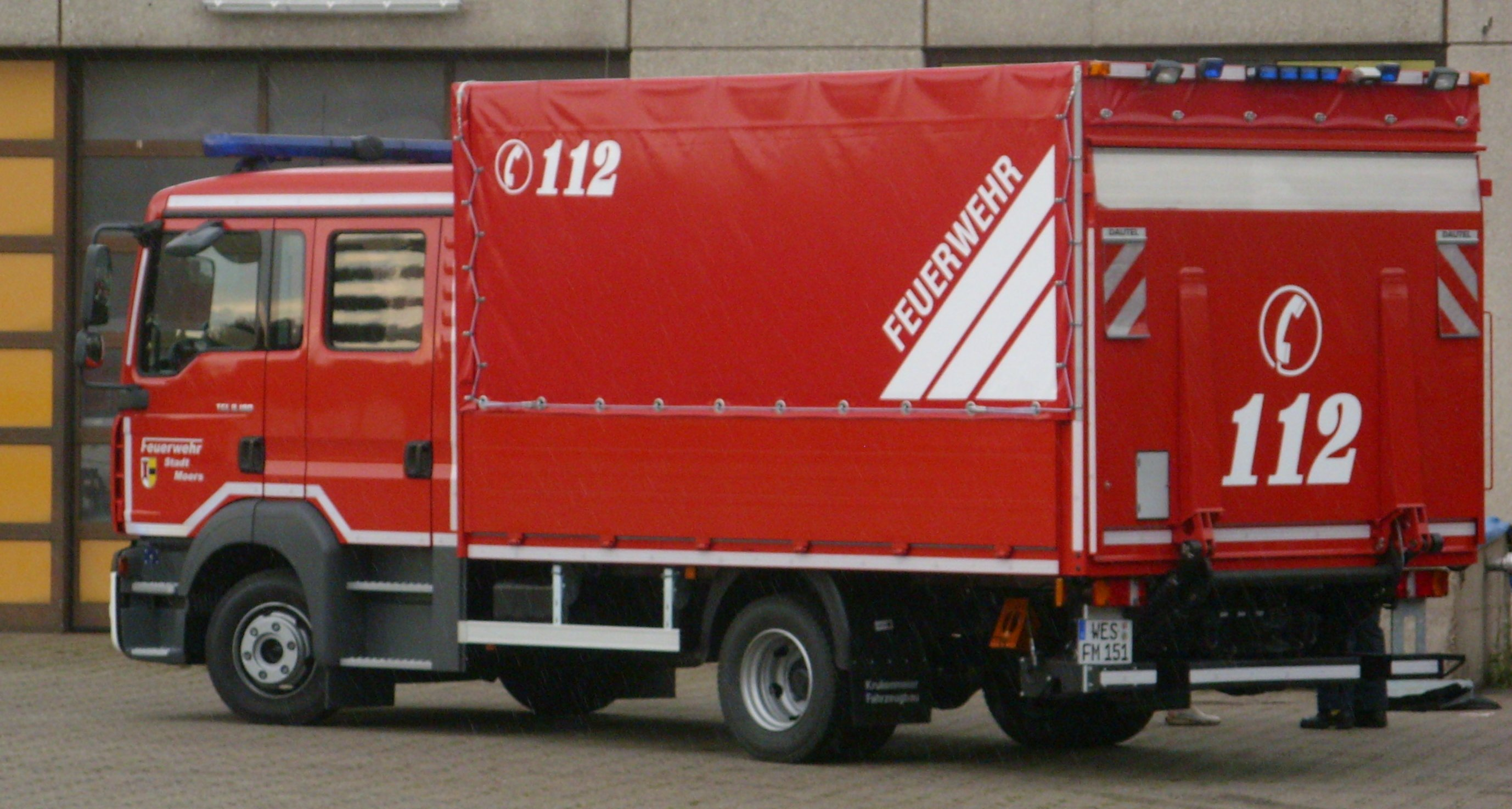 Der im Juli 2009 für die Feuerwehr Moers gelieferte Gerätewagen GW-Logistik 1 für den Löschzug Stadtmitte (LZ 1)